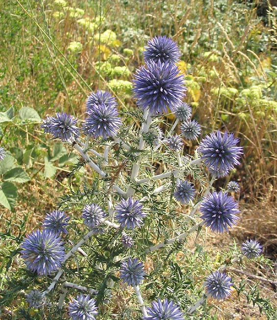 Echinops ritro (azurite, oursin bleu) Photo prise à Trévillach en juillet 2004 Jean Tosti 09/2004